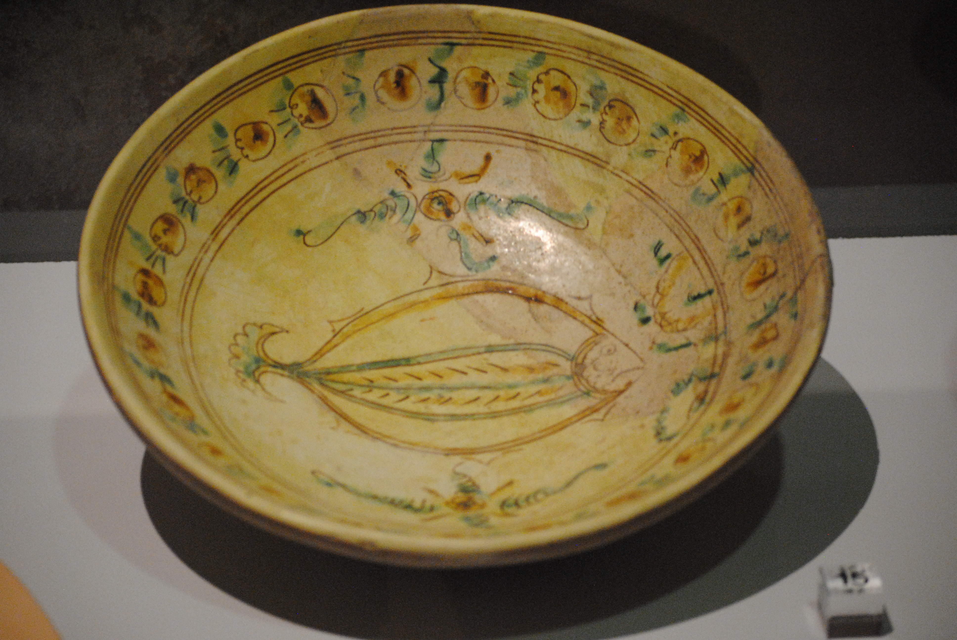 Catino ingobbiato e graffito a punta, databile tra la fine XVI secolo - e gli inizi XVII secolo (restituito dagli scavi di lungarno Simonelli, Pisa) - Museo nazionale di San Matteo.